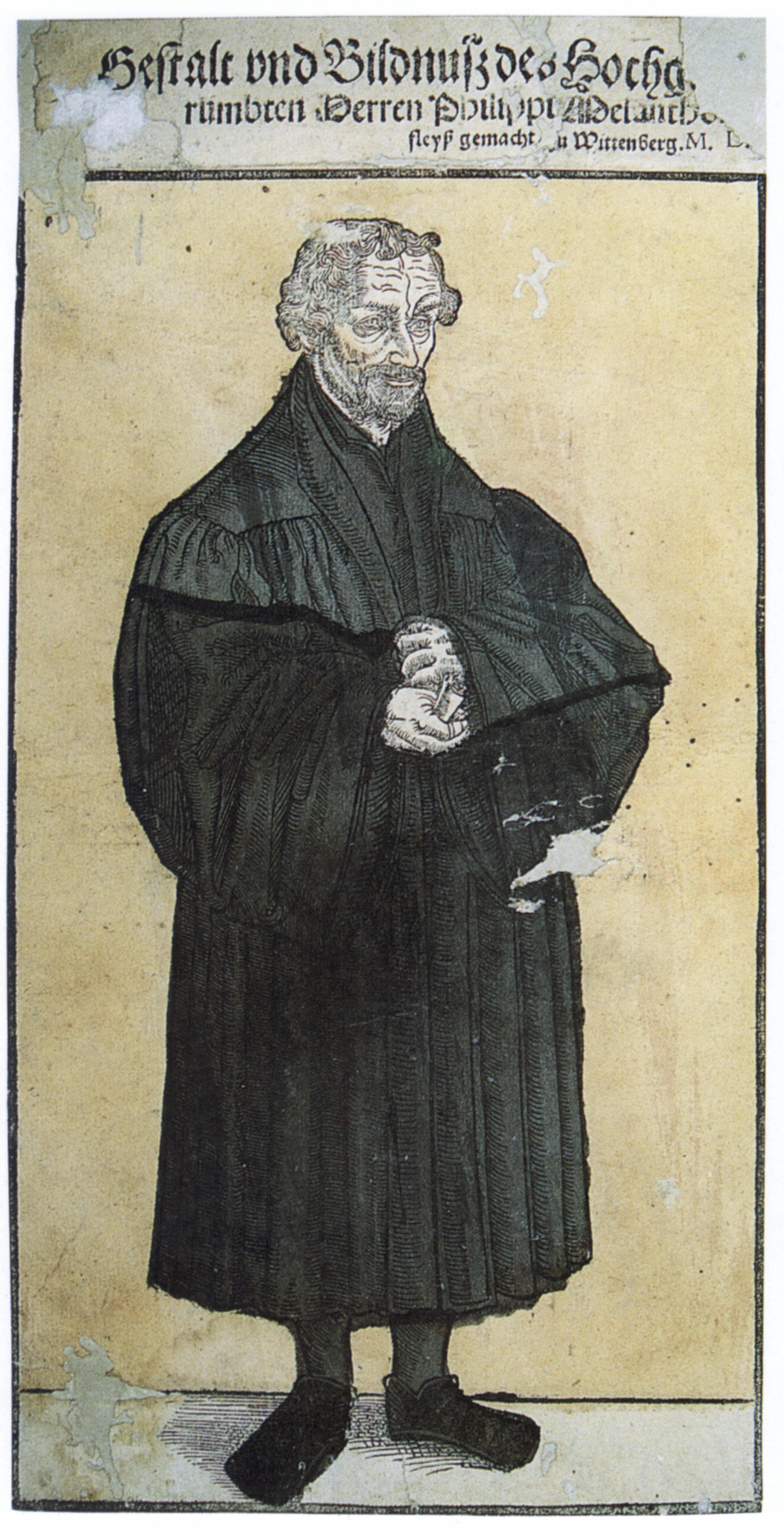 Philipp Melanchthon, Holzschnitt von Hans Daubmann, Nürnberg, 16. Jh. (Prädikantenbibliothek Isny)